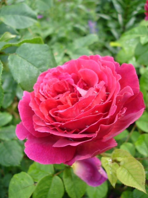 Rosa 'Auslo' (OTHELLO™)